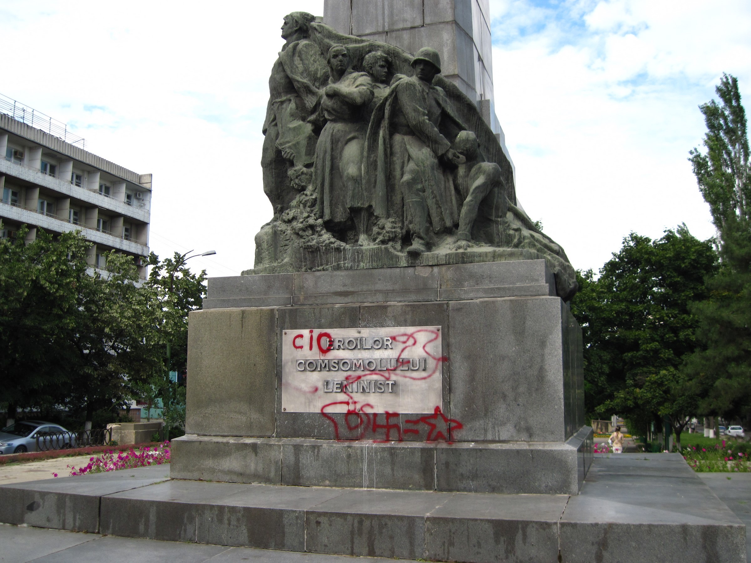 Komsomol monument vandalized